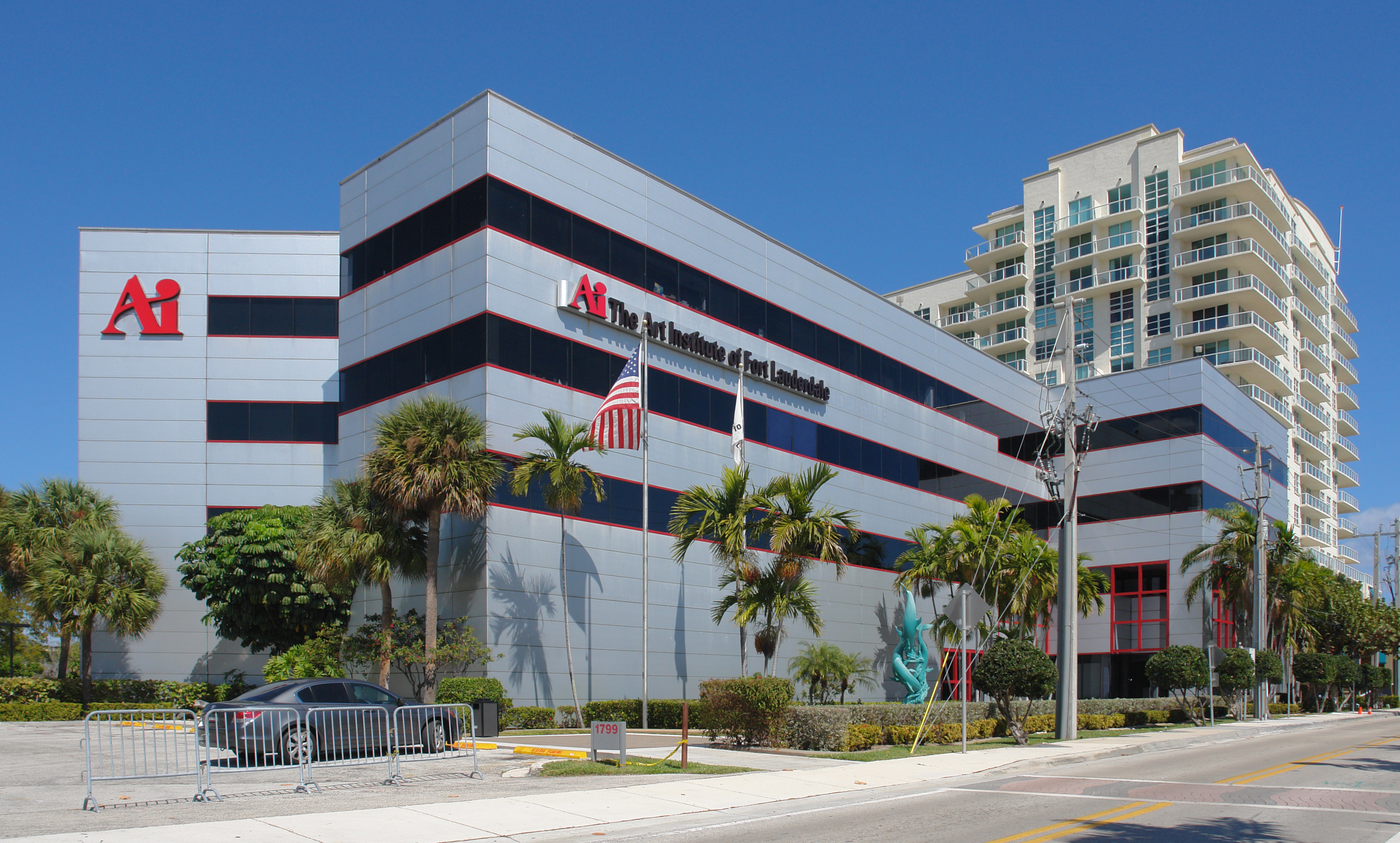 Fort Lauderdale Art-Institute